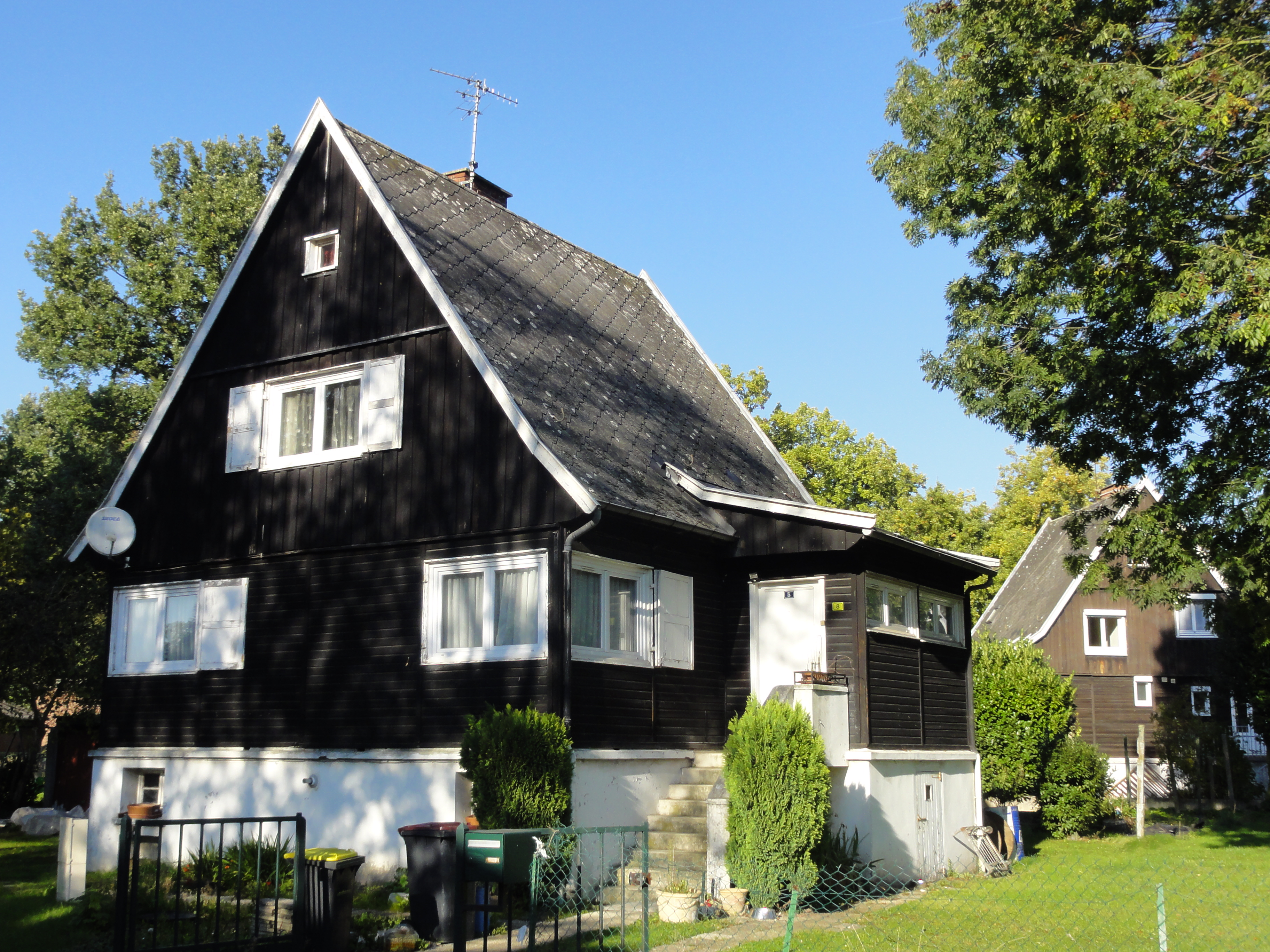 Cité de la Forêt de la fosse no 2 de la Compagnie des mines d'Ostricourt dans le bassin minier du Nord-Pas-de-Calais, Libercourt, Pas-de-Calais, Nord-Pas-de-Calais, France. La cité de la Forêt est inscrite sur la liste du patrimoine mondial de l'Unesco le 30 juin 2012 et y constitue en partie le site no 38.